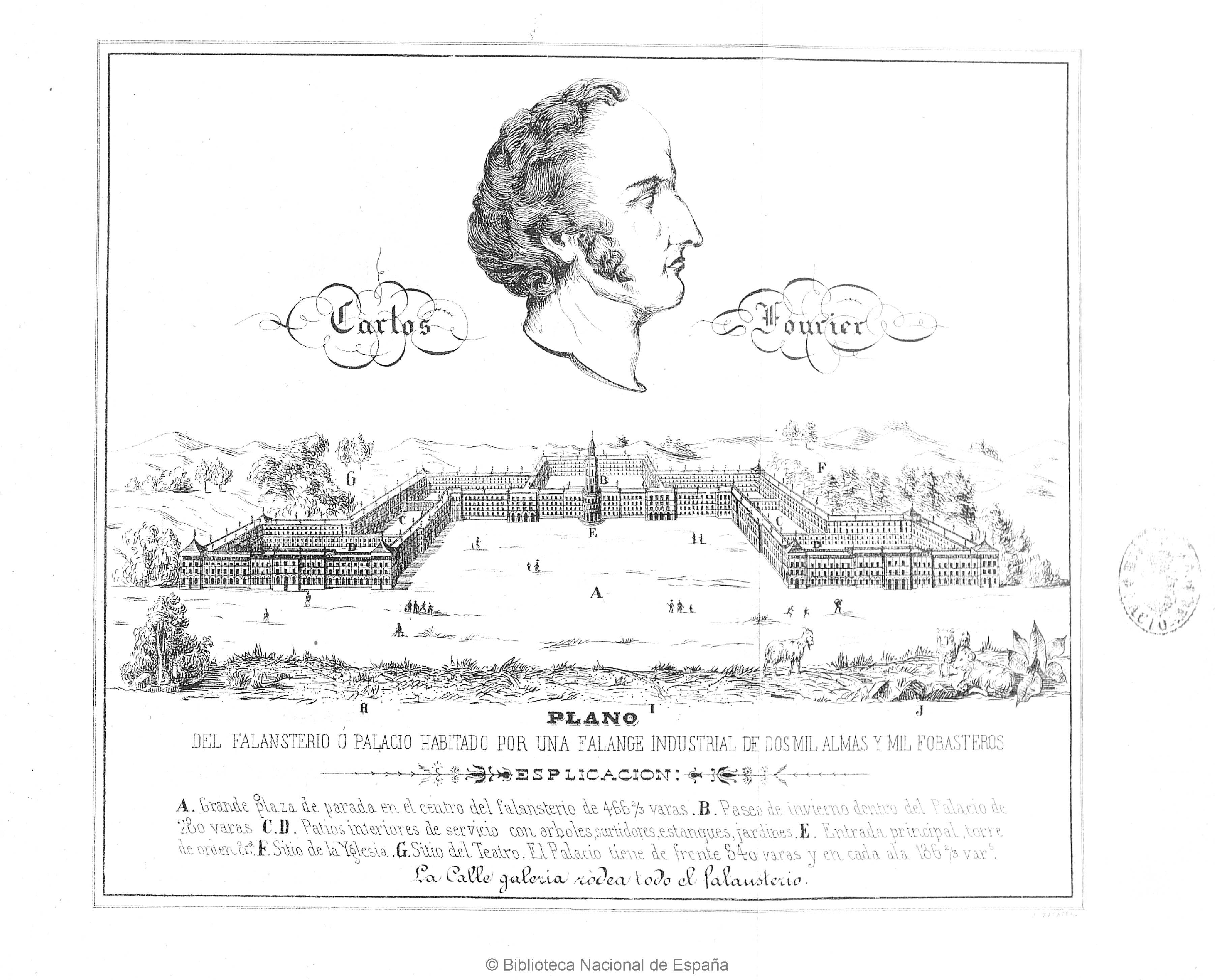 Fourier, o sea explanación del sistema social Autor: Fourier, Charles (1772-1837) Fecha: 1870 Datos de edición: Madrid, Imp. de La Discusión, a cargo de Federico Cañas